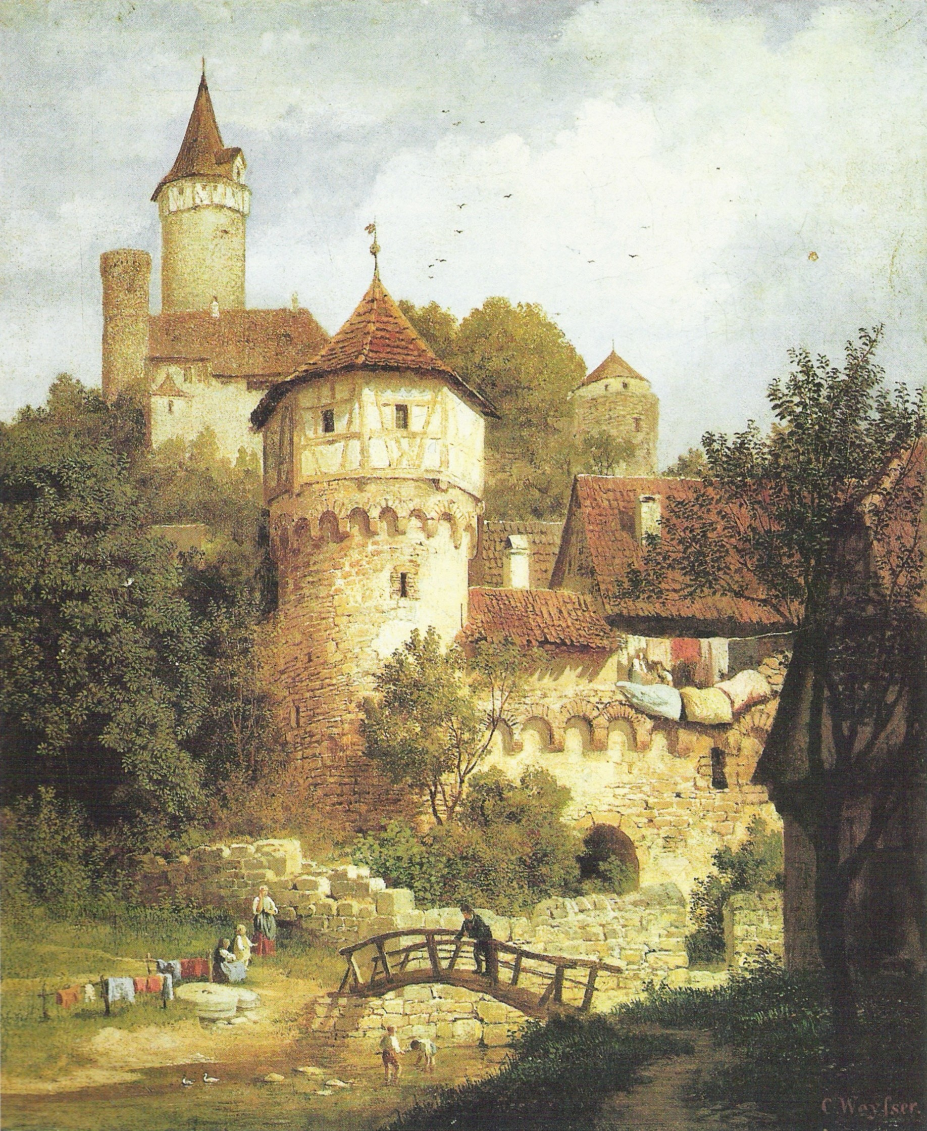 Möckmühl mit Stadtmauer und Burg, Öl auf Leinwand